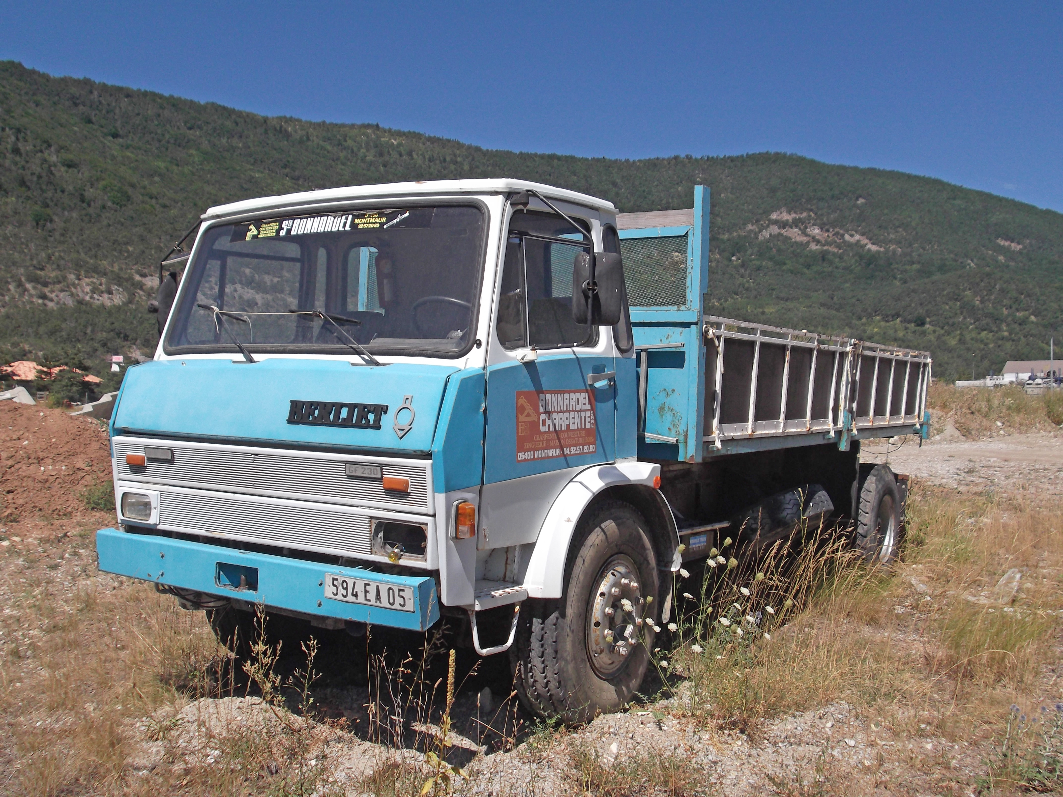 Berliet GF 230